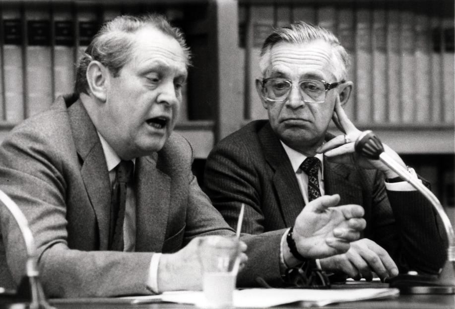 P.J. Lardinois (KVP) als ex-minister tijdens de hoorzitting betreffende de behandeling van zwart geld door banken en overheid. Den Haag, Nederland, 27 januari 1983.